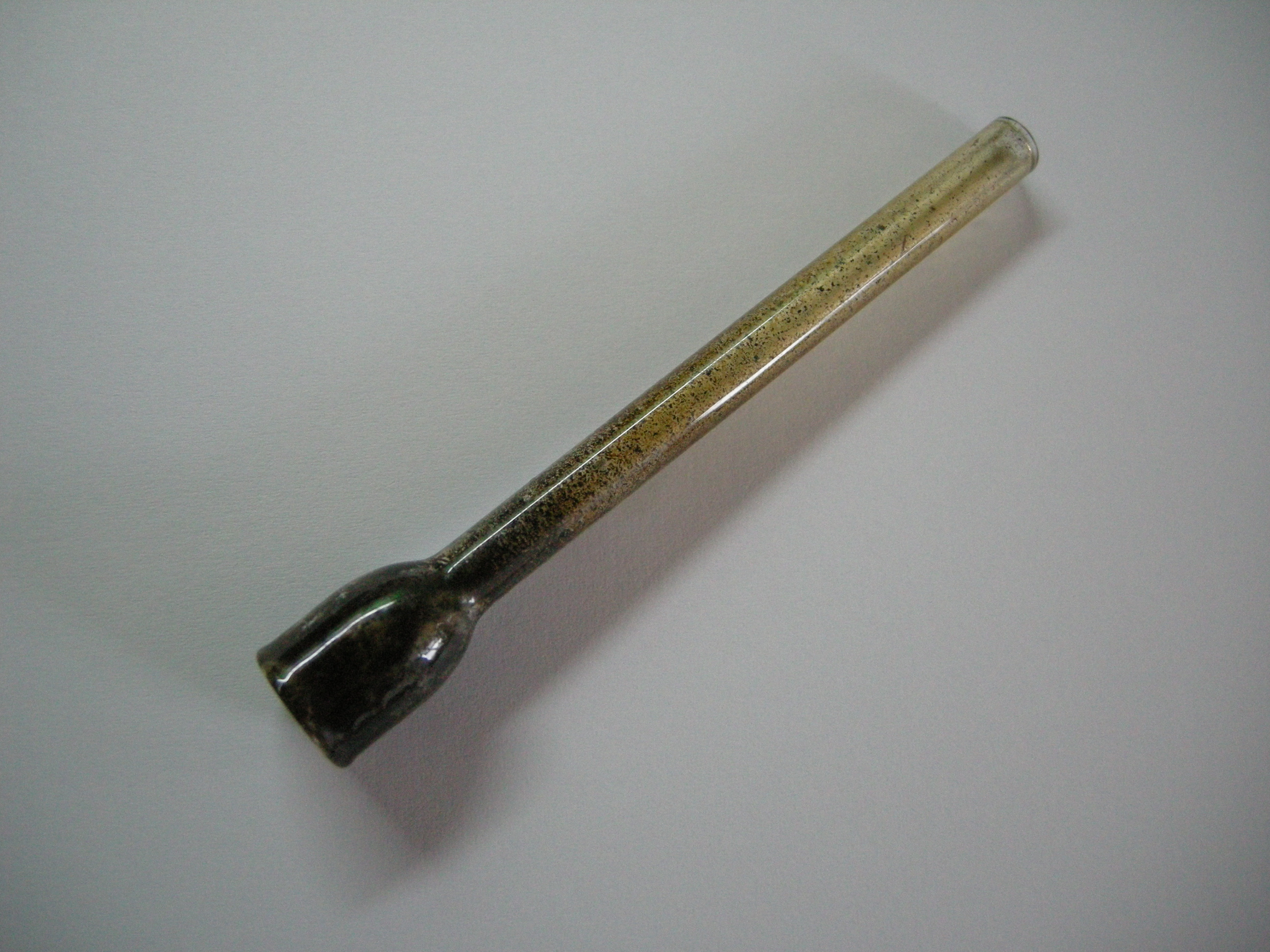 Skleněnka - malá skleněná trubička s takzvaným kotlem (rozšíření na konci), kam se nacpe marihuana, která se zapálí a vdechuje. Ačkoliv je skleněnka stará pouze týden, jde vidět jak je zanesená, a tohle kuřáci marihuany vdechují do plic.